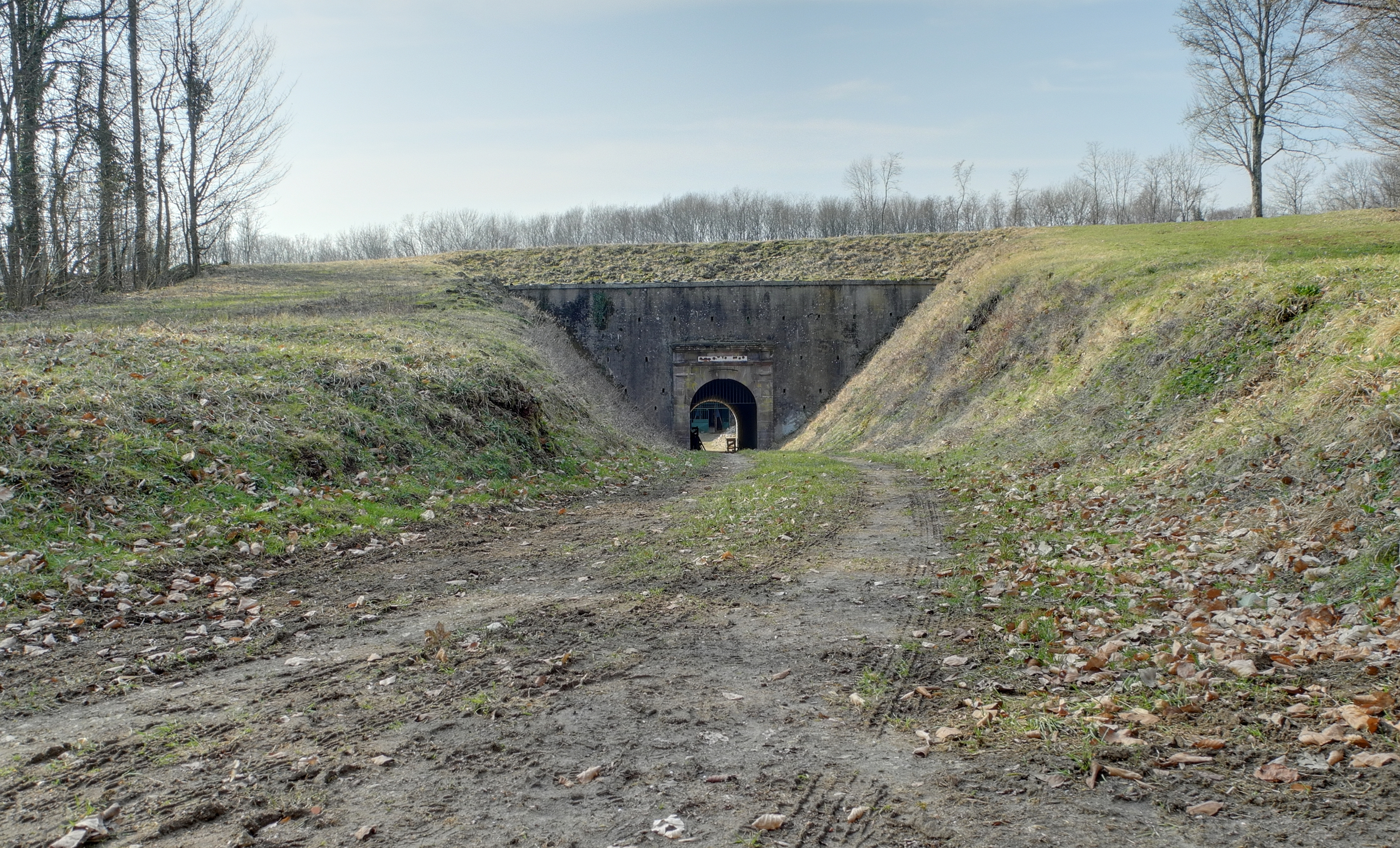 Ouvrage de la Côte d'Essert : entrée (HDR).